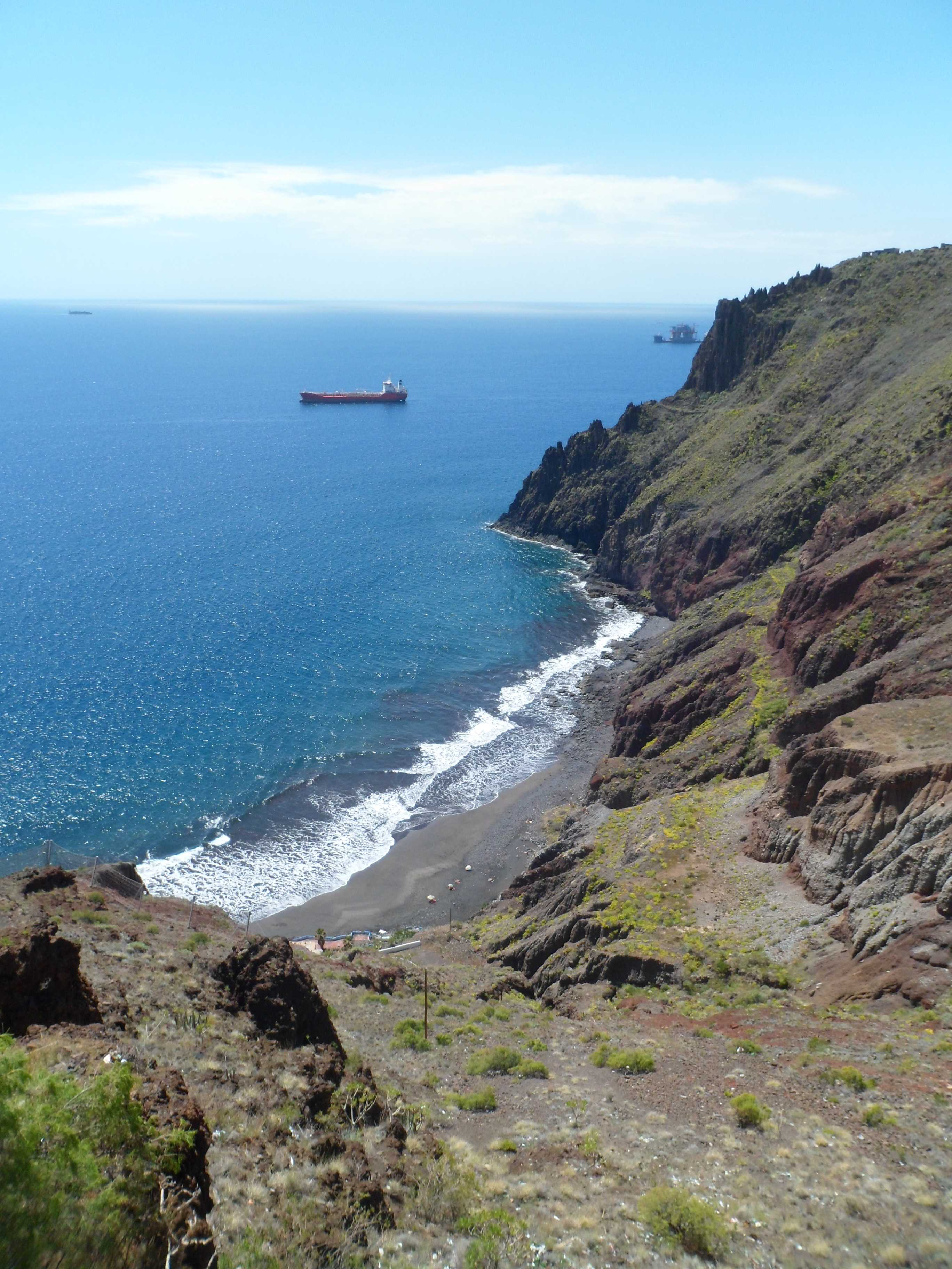 Vista de la playa de Las Gaviotas, Tenerife.